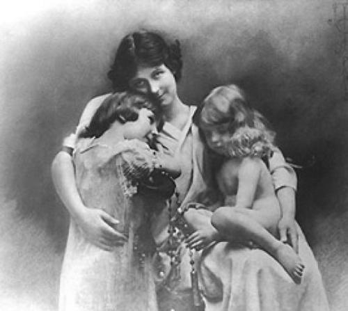 Isadora Duncan avec ses deux enfants. Photod'Otto Wegener 1911. Publié dans l'autobiographie d'Isadora Duncan, My Life, 1927. Les deux enfants décèdent le 19 avril 1913 dans un accident de la route.